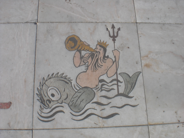 Neptuno sur kahelo en la Monumento al la Malkovroj.